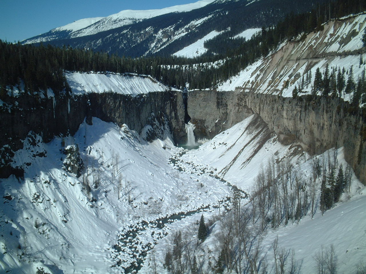 Keyhole FallsKeyhole